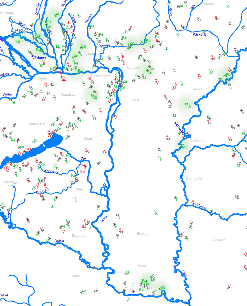 A kürt törzsnév elterjedése a Kárpát-medencében